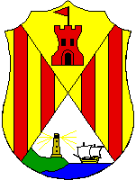 WRONG HERALDIC VERSION OF CASTELL PLATJA D'ARO'S COAT OF ARMS